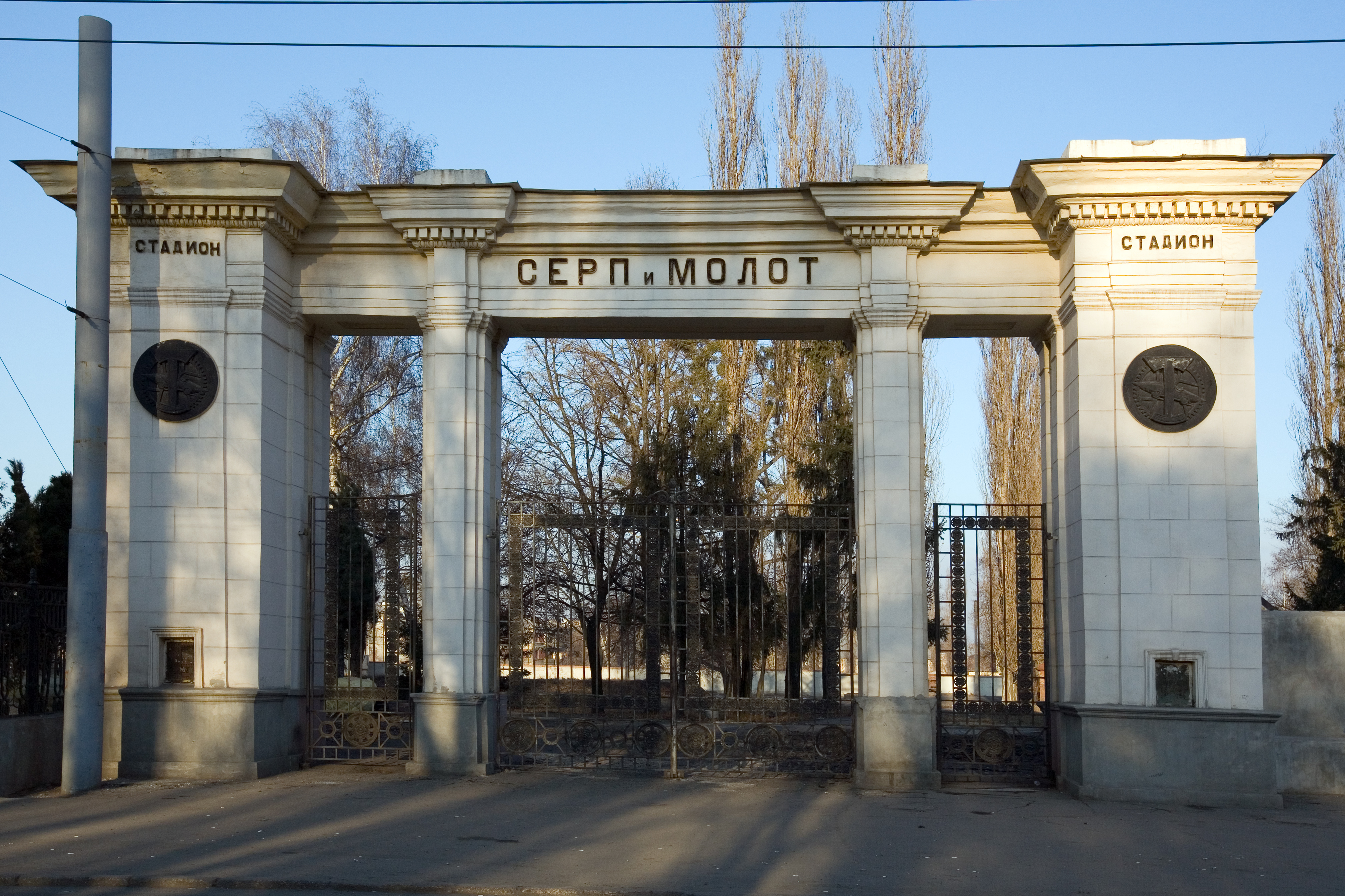 Serp&Molot Stadium, Moskovsky Prospekt, Kharkov.